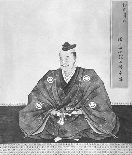 武田信広の肖像。